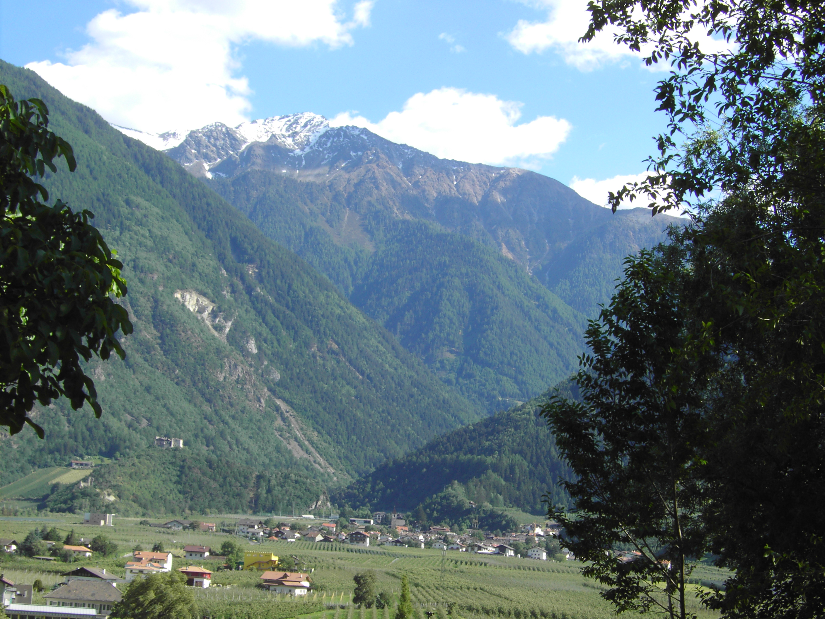 Morter im Vinschgau (Südtirol)